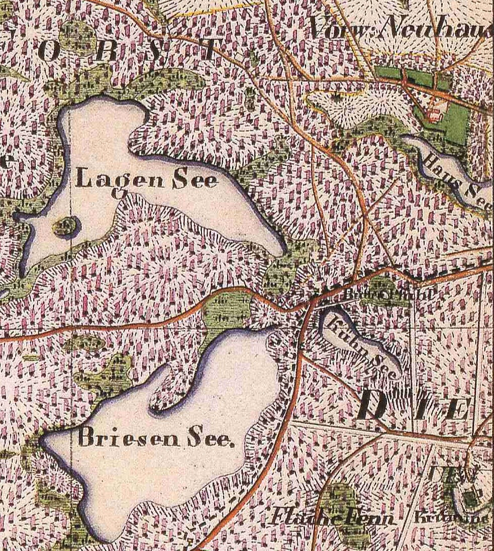 Neuhaus, Wohnplatz im Ortsteil Steinhöfel der Stadt Angermünde, Lkr. Uckermark, Brandenburg, sowie Briesensee, Kiehnsee und Laagensee, Ausschnitt aus dem Urmesstischblatt 2948 von 1826